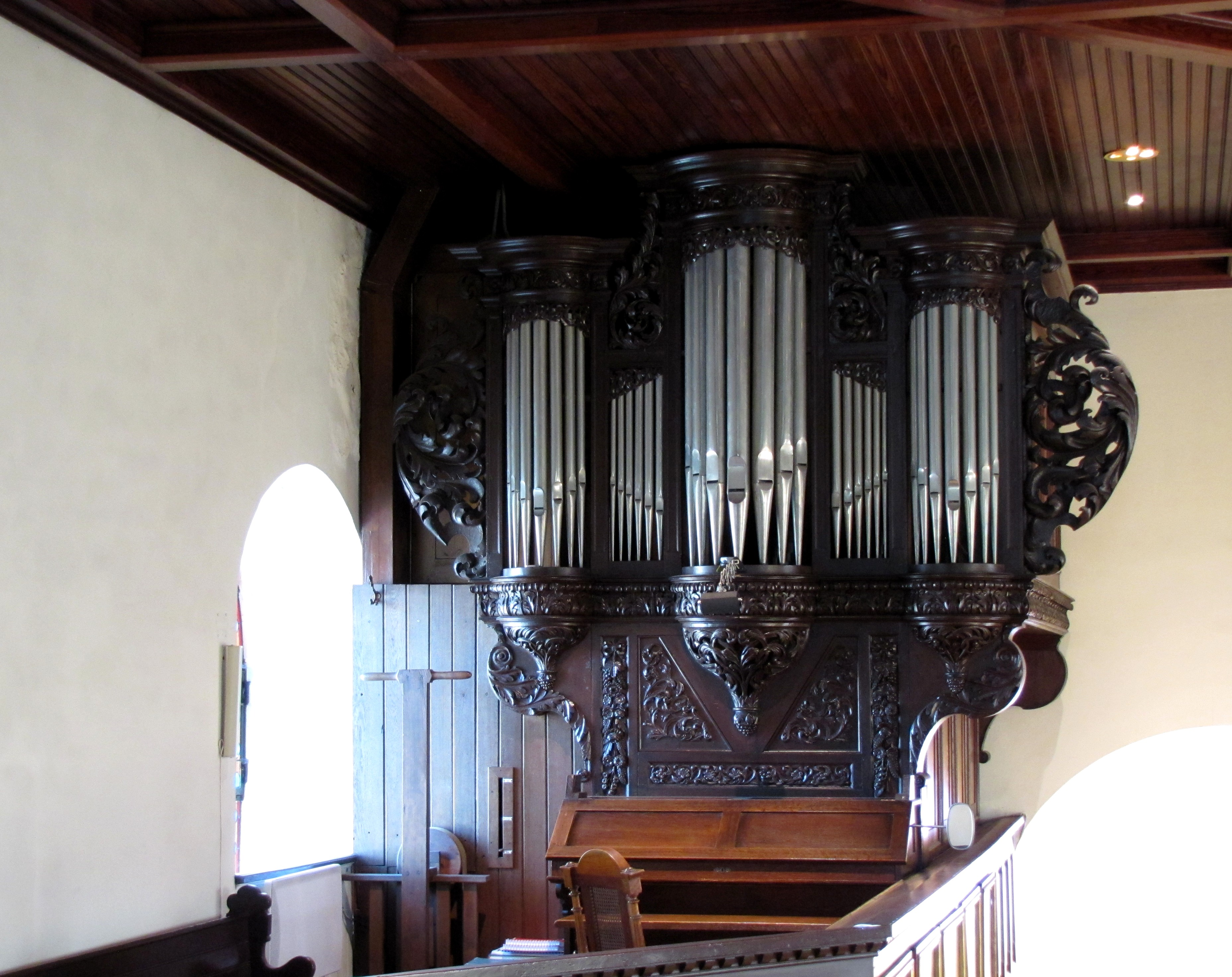 Alsace, Bas-Rhin, Église protestante Saint-Gall d'Ittenheim (IA67007197). Orgue Andreas Silbermann (1703): This object is classé Monument Historique in the base Palissy, database of the French furniture patrimony of the French ministry of culture, under the references PM67001030, IM67010755 and buffet PM67000608 buffet.